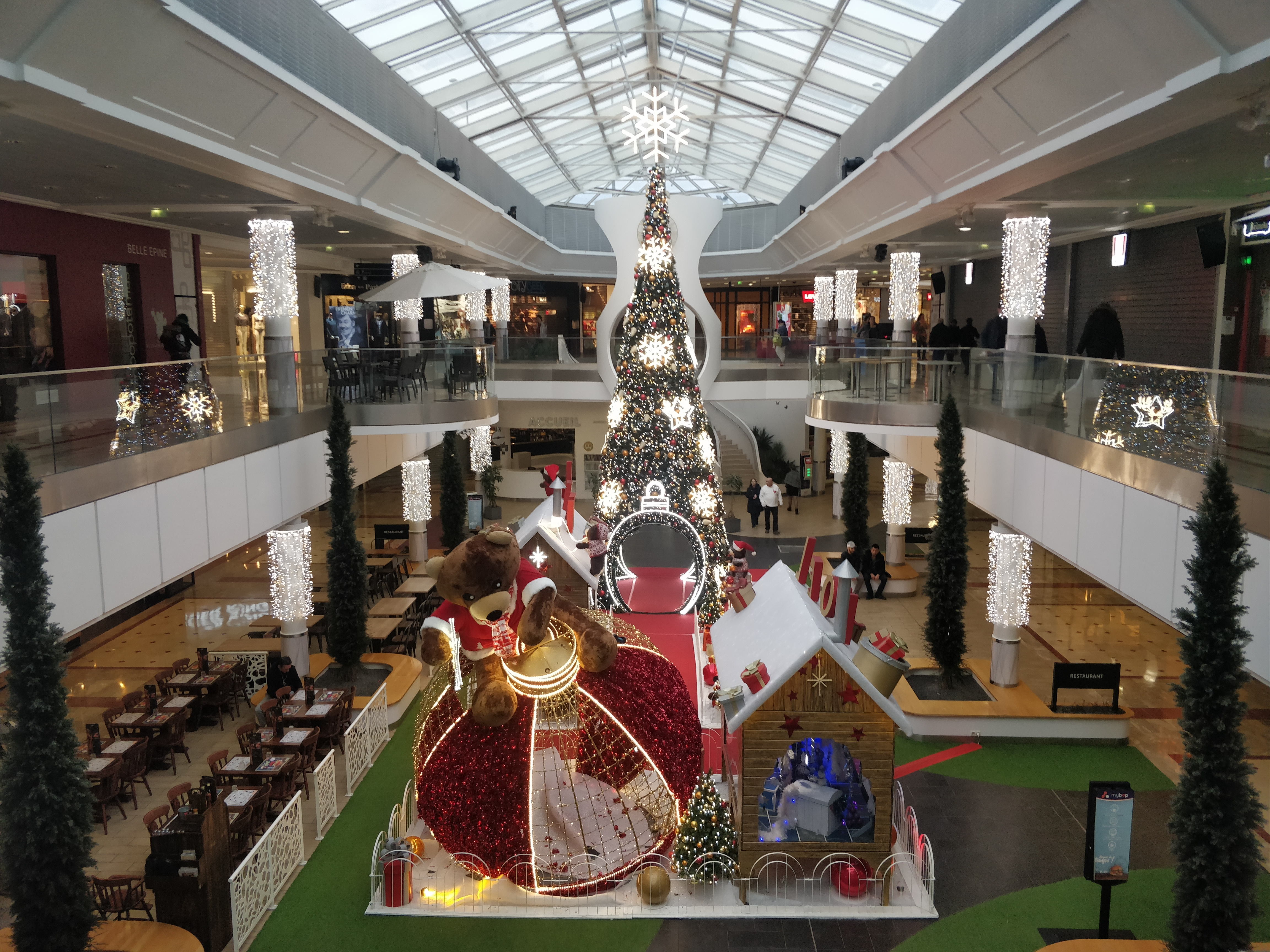 Noël au centre commercial Belle Épine, Thiais.